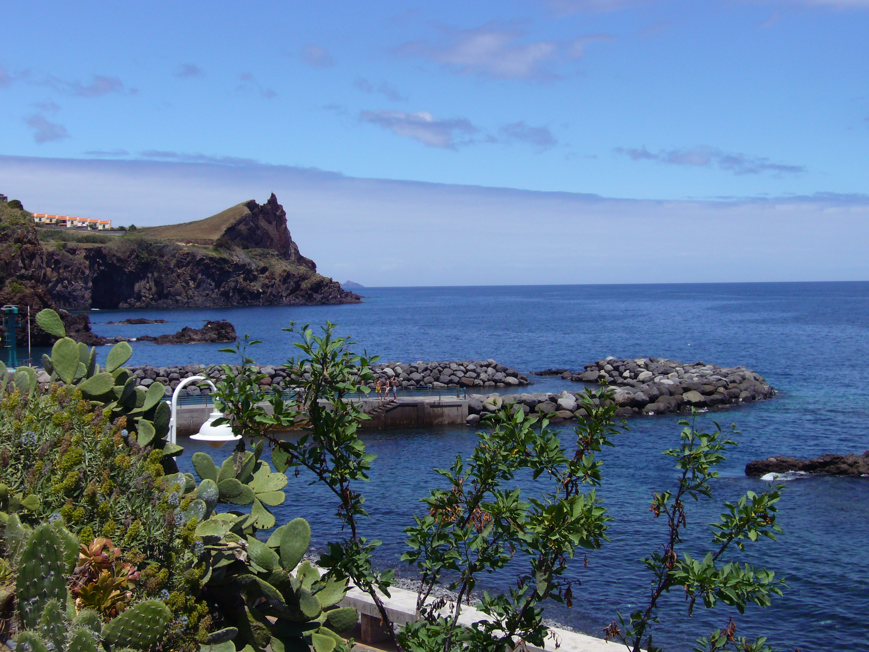 Seashore at Caniço de Baixo - Madeira